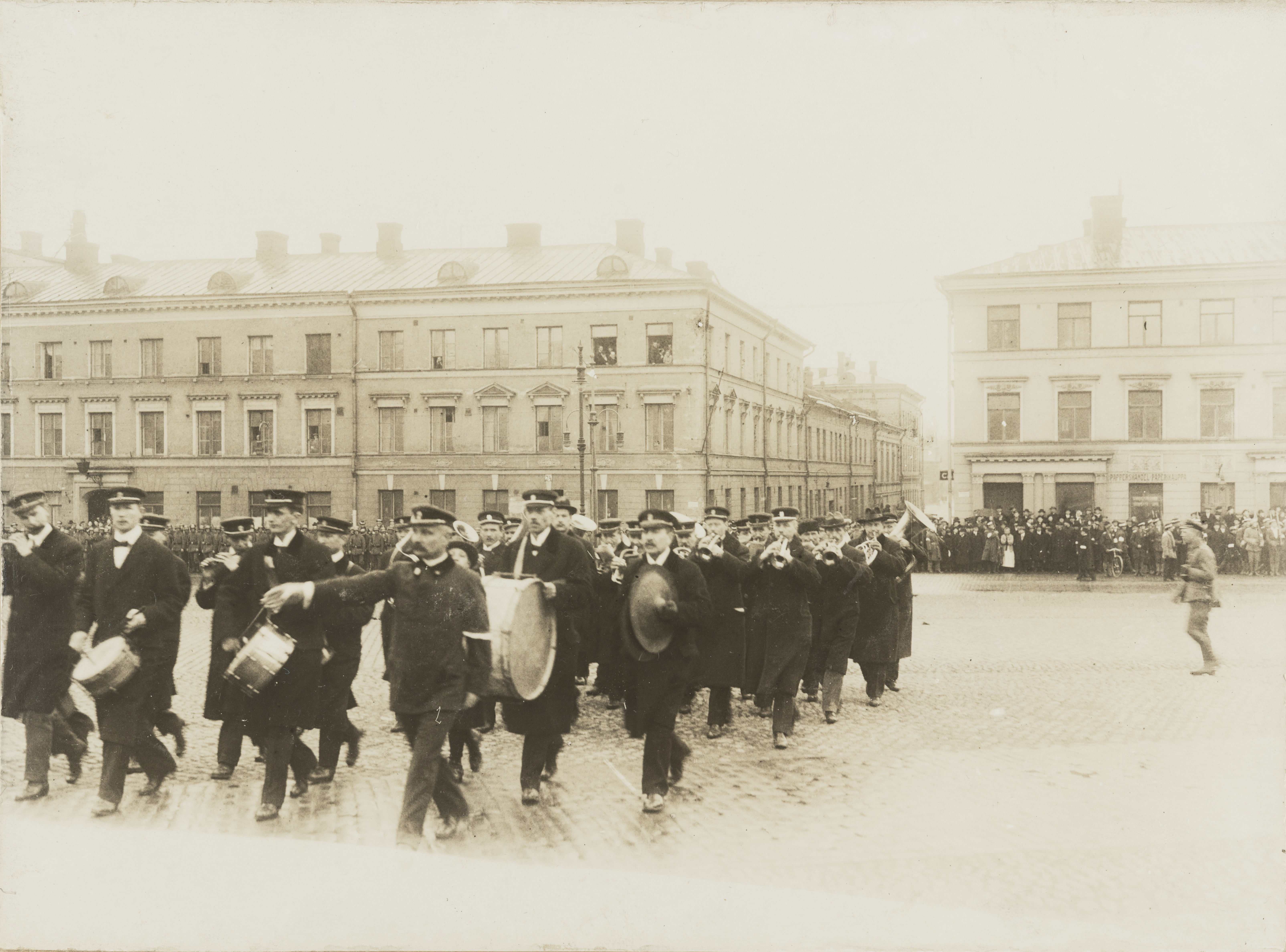 valkokaartin soittokunta Senaatintorilla; vaaka, mustavalkoinen